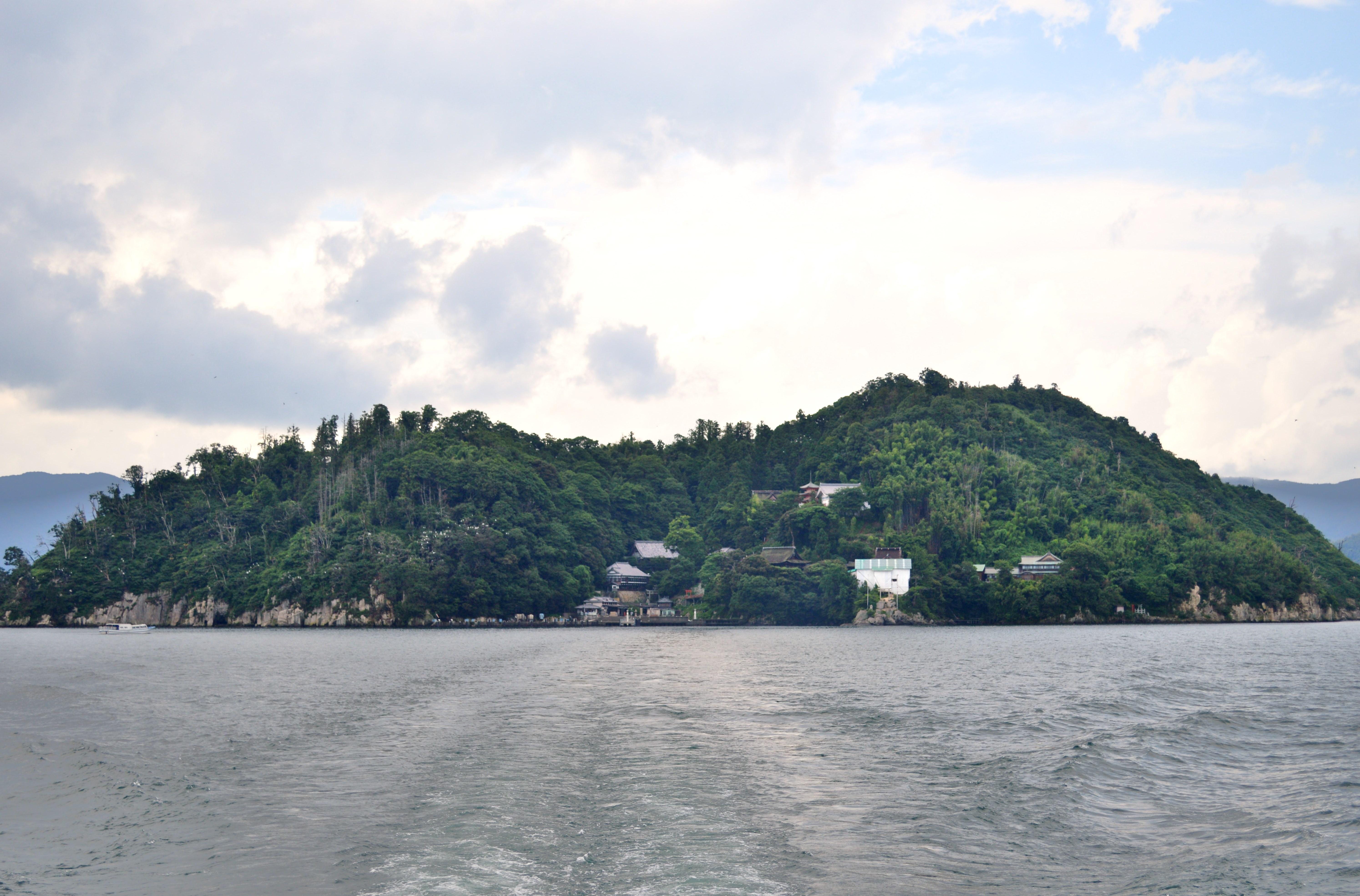 竹生島 遠景 (フェリーより)